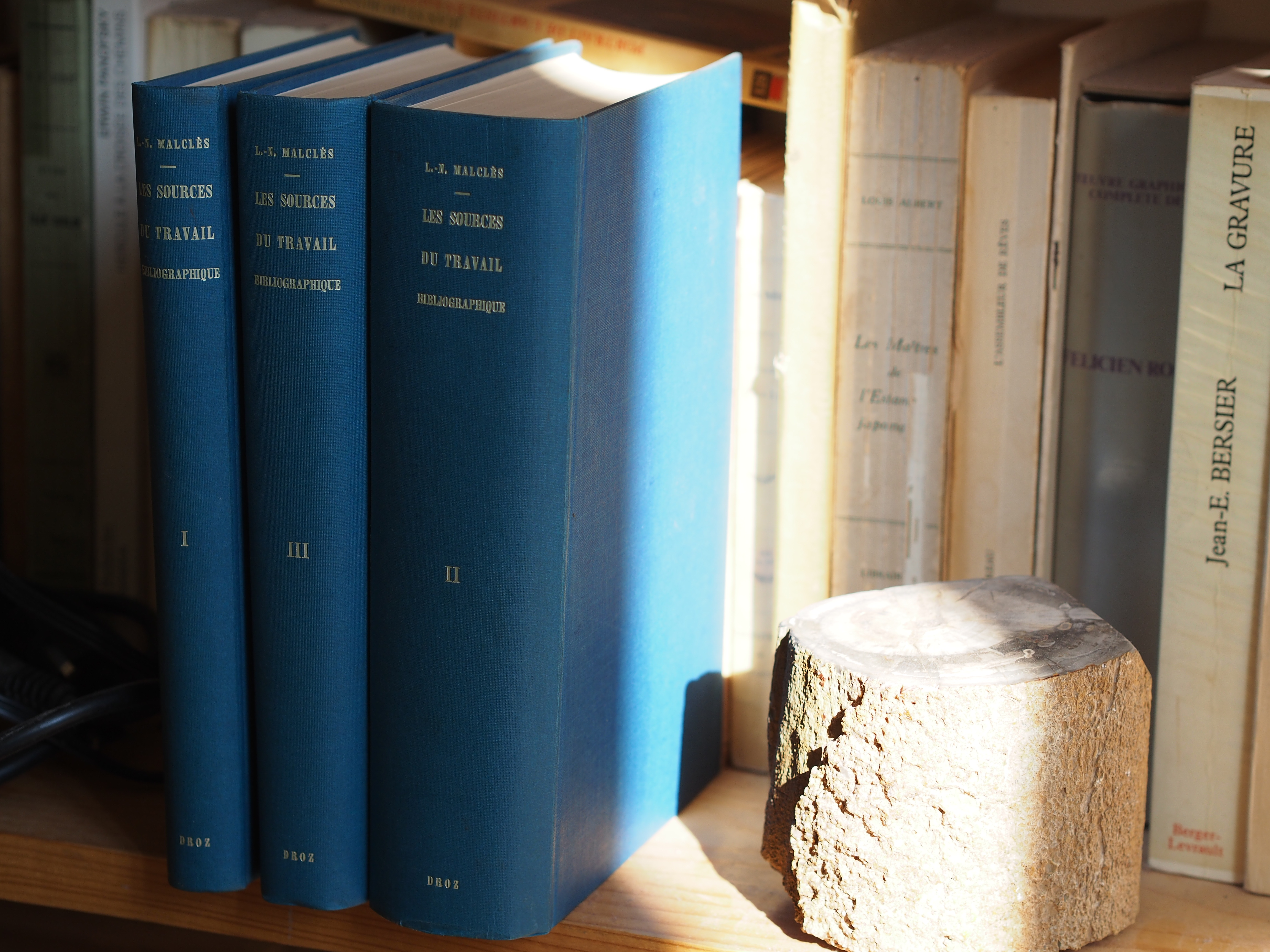 Louise-Noëlle Malclès (1899-1977), Les Sources du travail bibliographique, Genève, Droz, 1950 (réimpression de 1965).